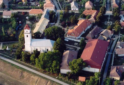 Tiszasas, Hungary, aerialphotography